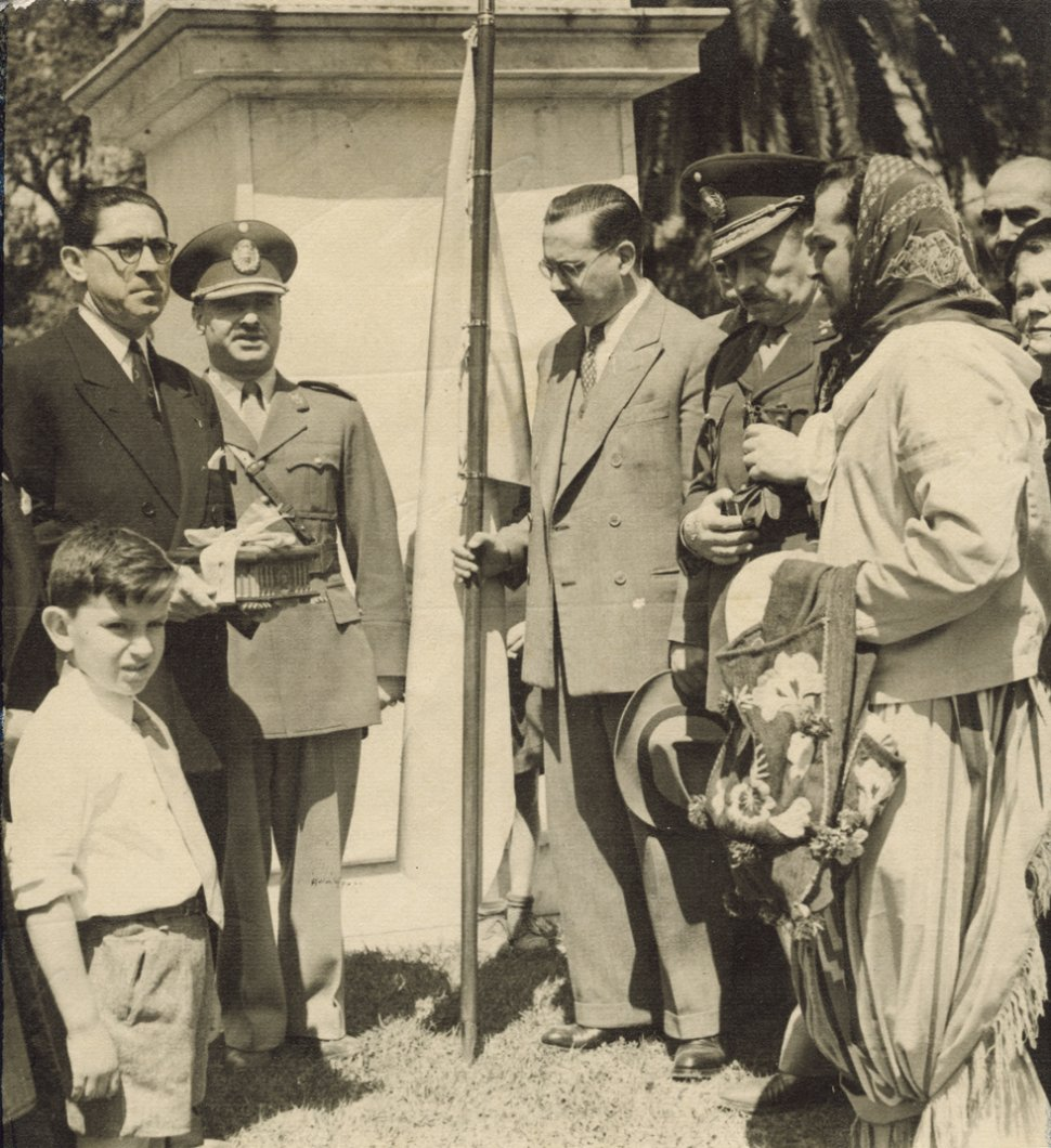 El gobernador de Tucumán, Fernando Pedro Riera, junto al Rector de la Universidad Nacional de Tucumán, Horacio Descole en un acto oficial. Año 1950